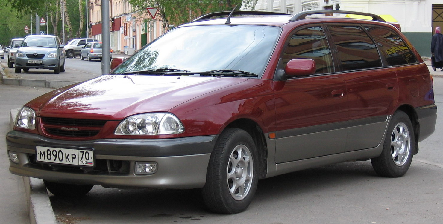 Photo taken in Tomsk, Russia